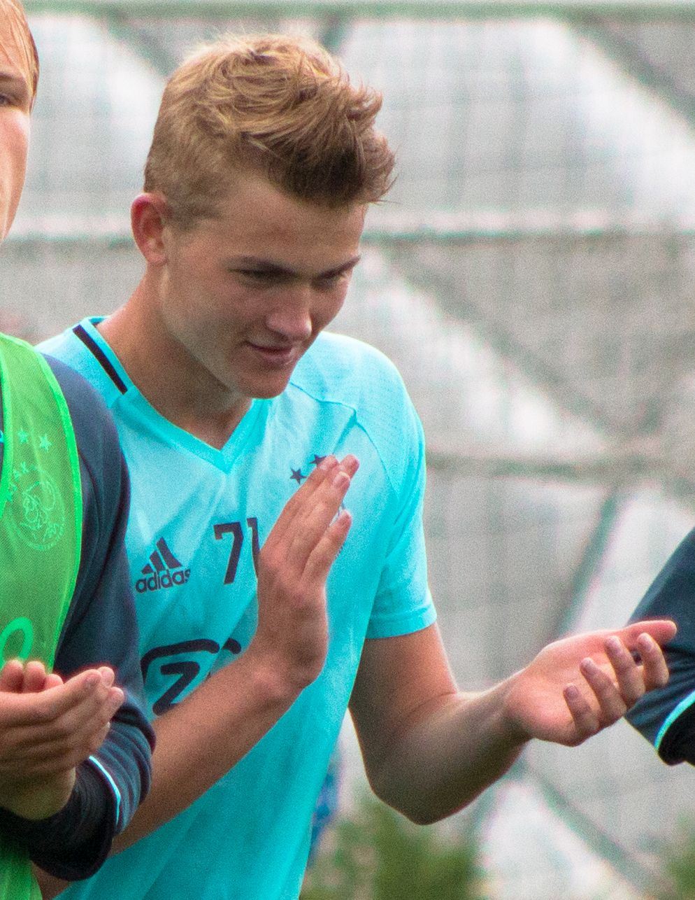 Ajax Open Training